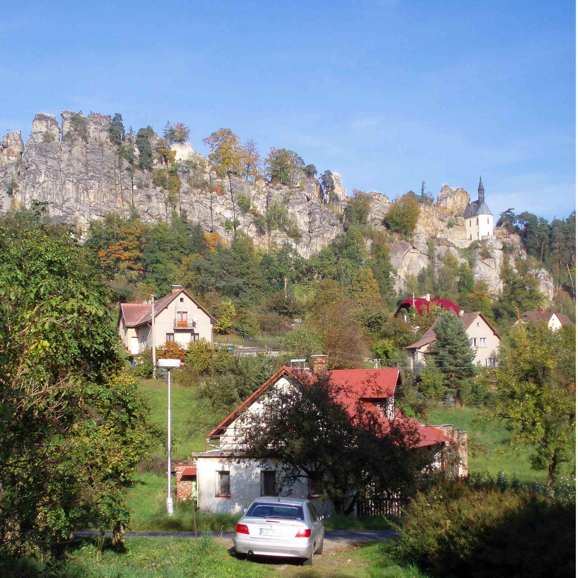 Vranov